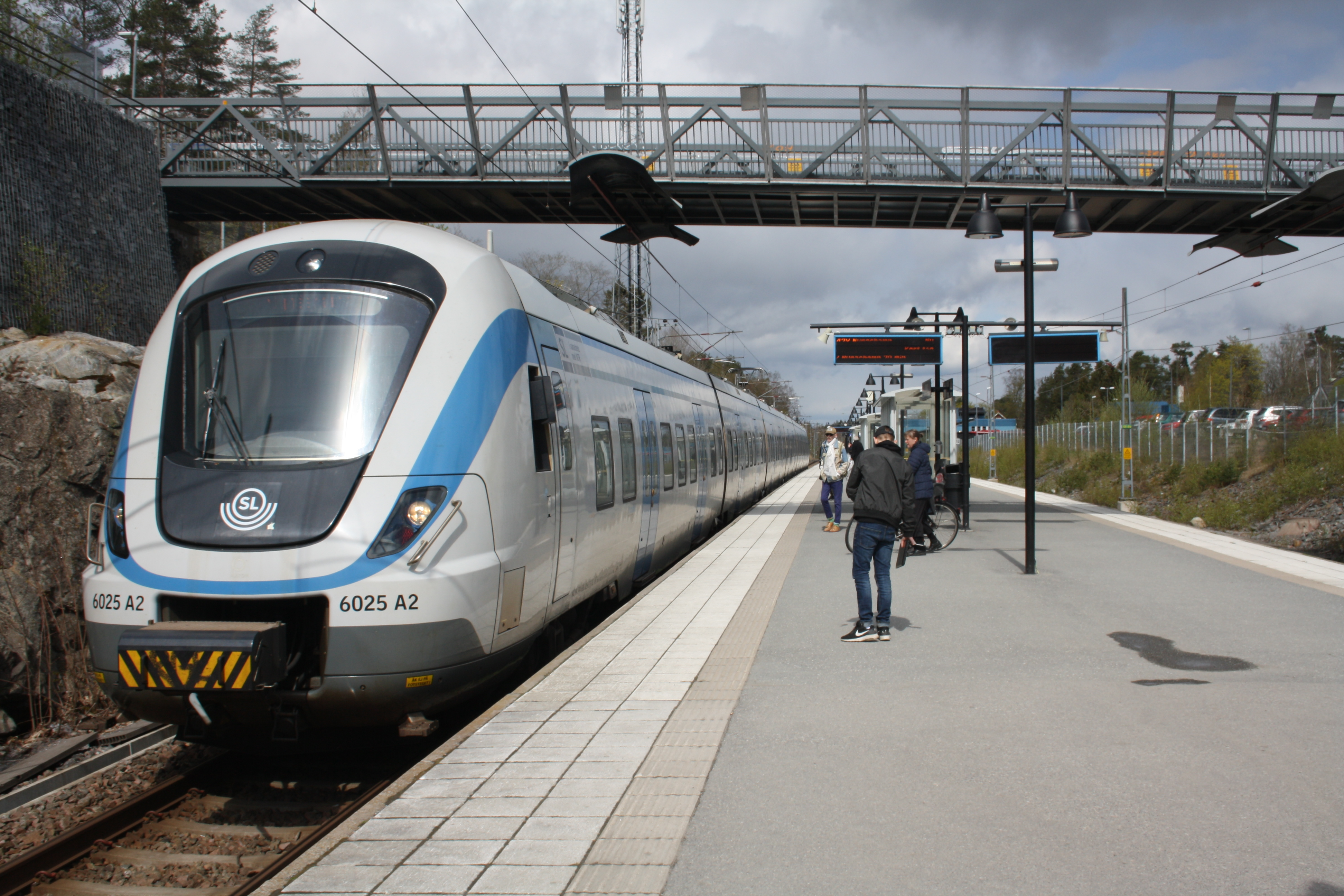 Ösmo station